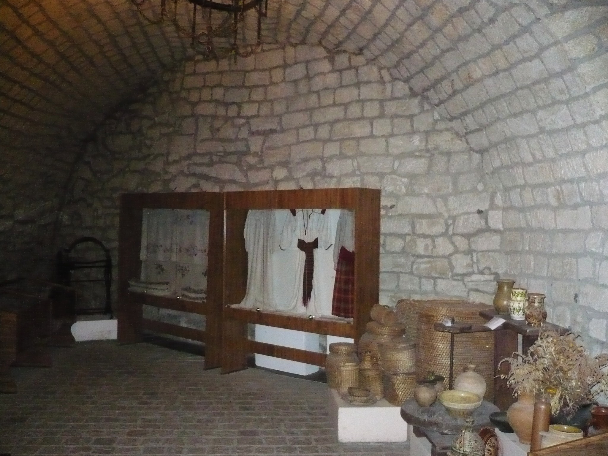 Zbaraż, kazamaty